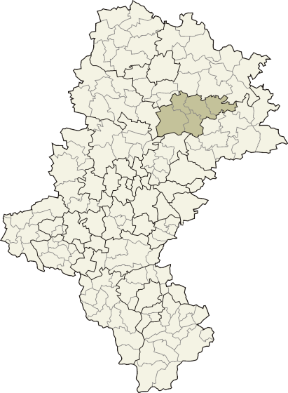 Powiat myszkowski w województwie śląskim